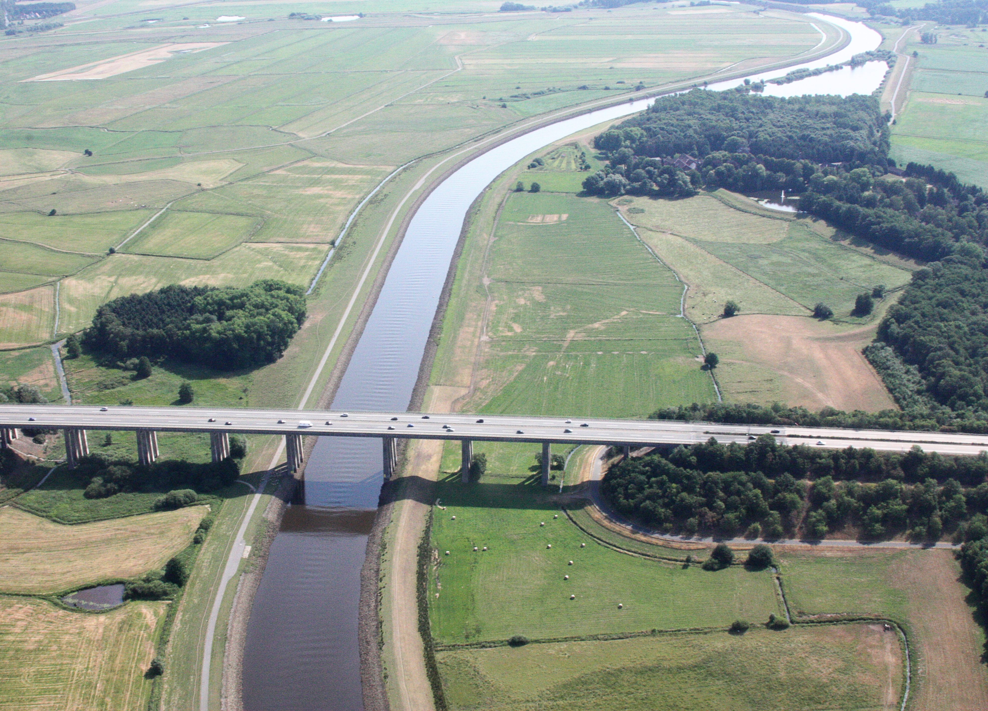 Luftaufnahmen Oldenburg (Oldenburg), mit Weiterflug nach Westen; 1500 Fuß Flughöhe; Juli 2010; Originalfoto bearbeitet: Tonwertkorrektur und Bild geschärft mit Hochpassfilter